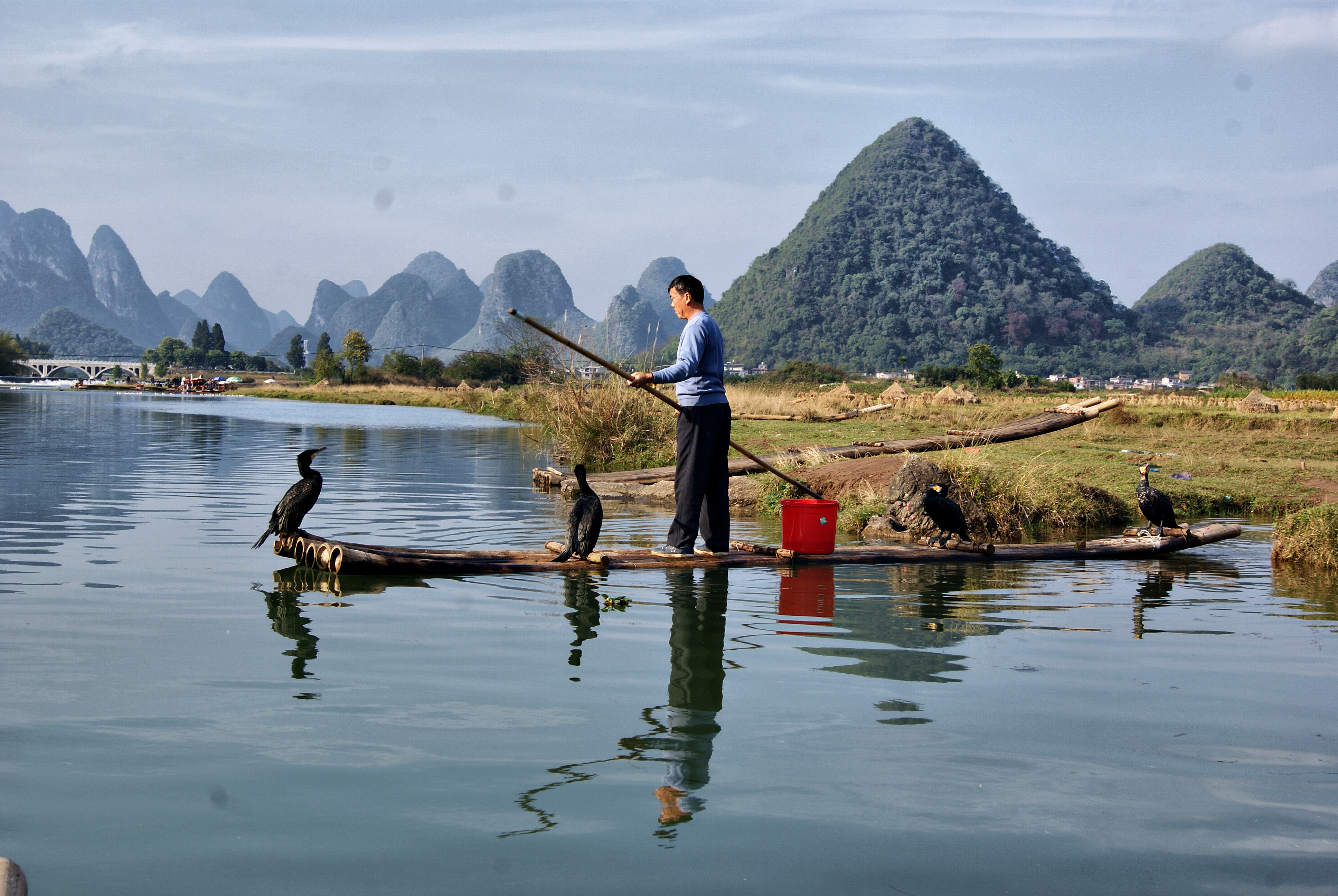 Yangshuo, Guilin, Guangxi, China